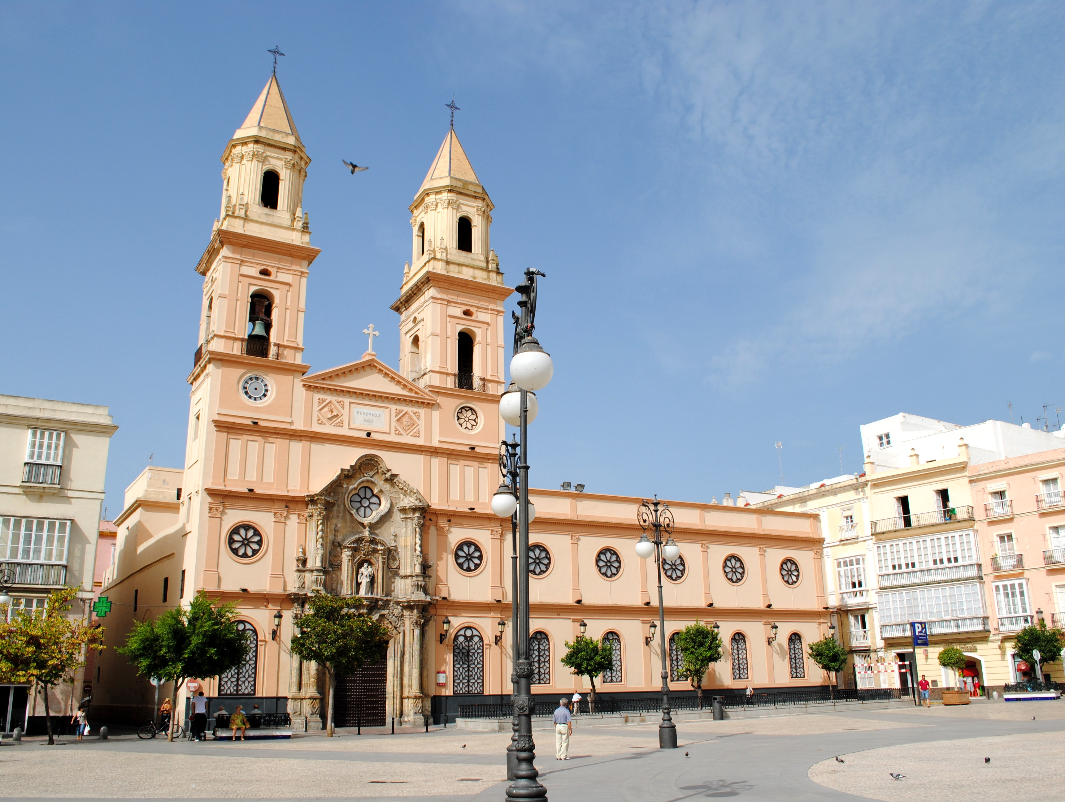 Iglesia de San Antonio de Padua, Cádiz. De su construcción en 1669, en estilo barroco, se conserva la fachada y el pórtico. Es de planta de cruz latina inserta en un rectángulo, con tres naves divididas en tramos por pilastras. La nave central se cubre con bóveda de cañón con arcos fajones y las laterales con bóvedas vaídas. El crucero presenta una cúpula sobre tambor y pechinas. Una reforma decimonónica le añadiría una torre. De su interior destacar el altar mayor, neoclásico, y la capilla sacramental, obra ecléctica de 1868.